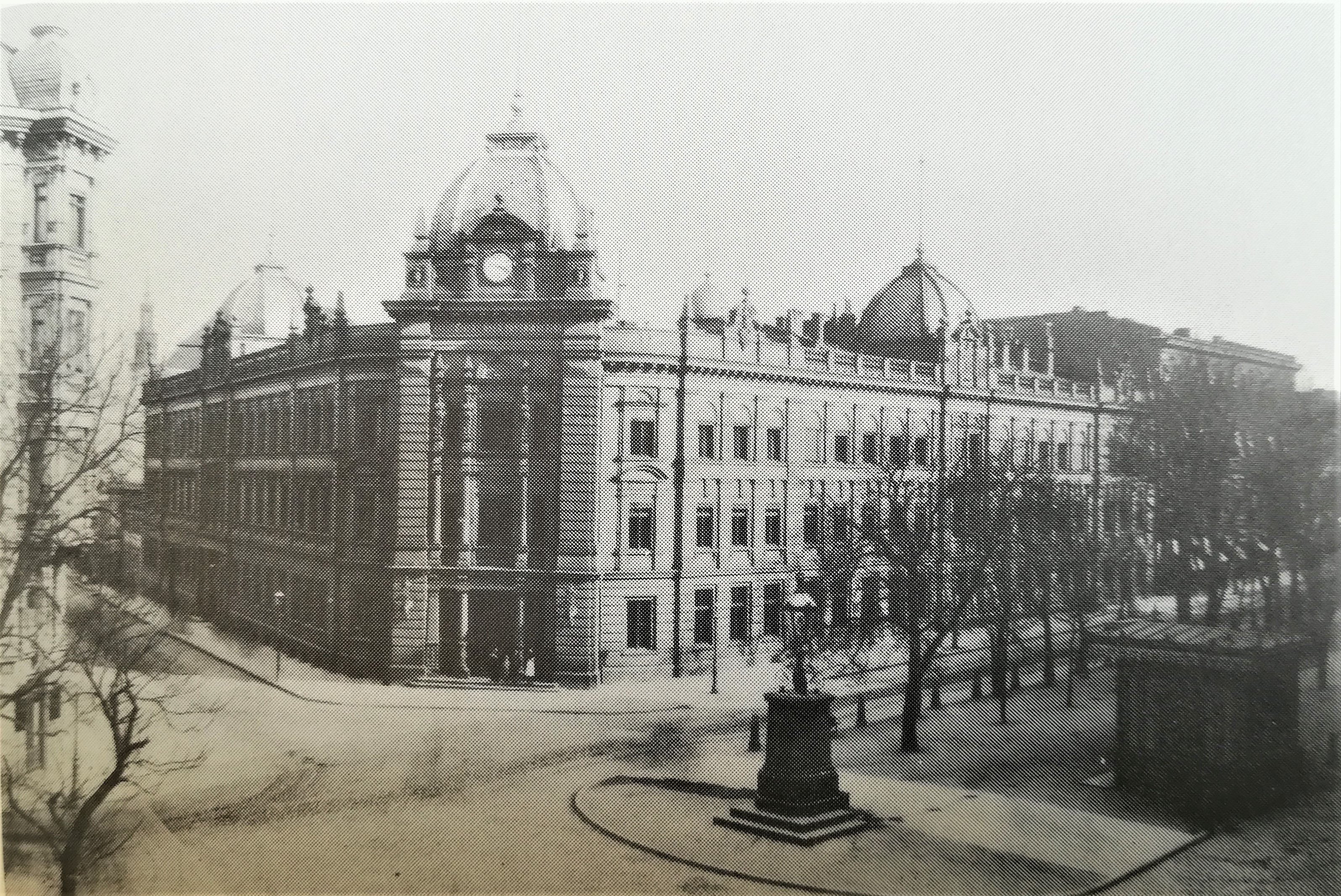 Gmach poczty przy Alejach Marcinkowskiego w Poznaniu róg ul. 23 Lutego. 1910 r.